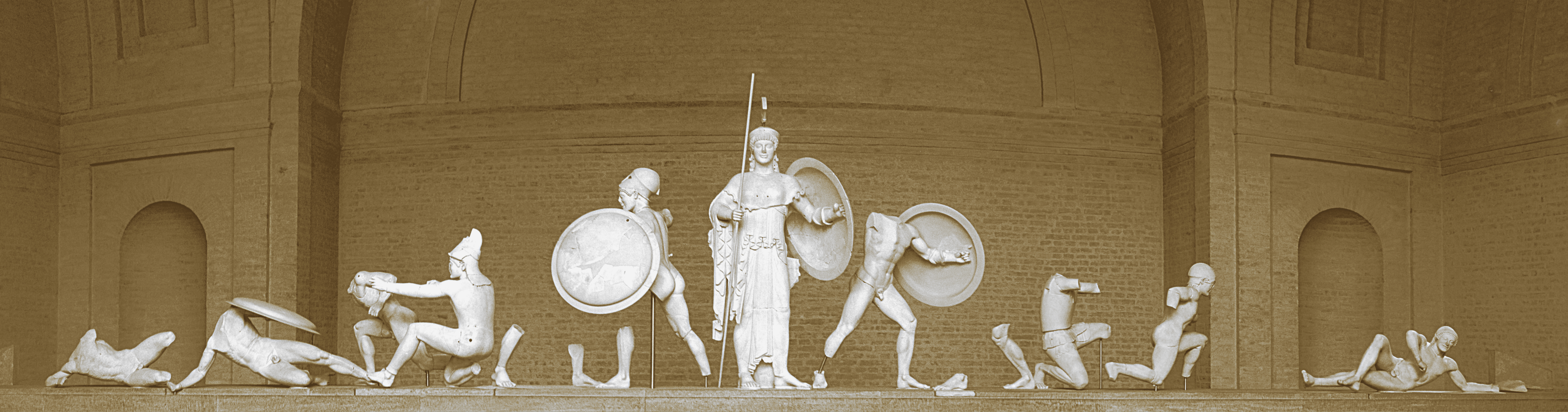 Западный фронтон храма Афайи